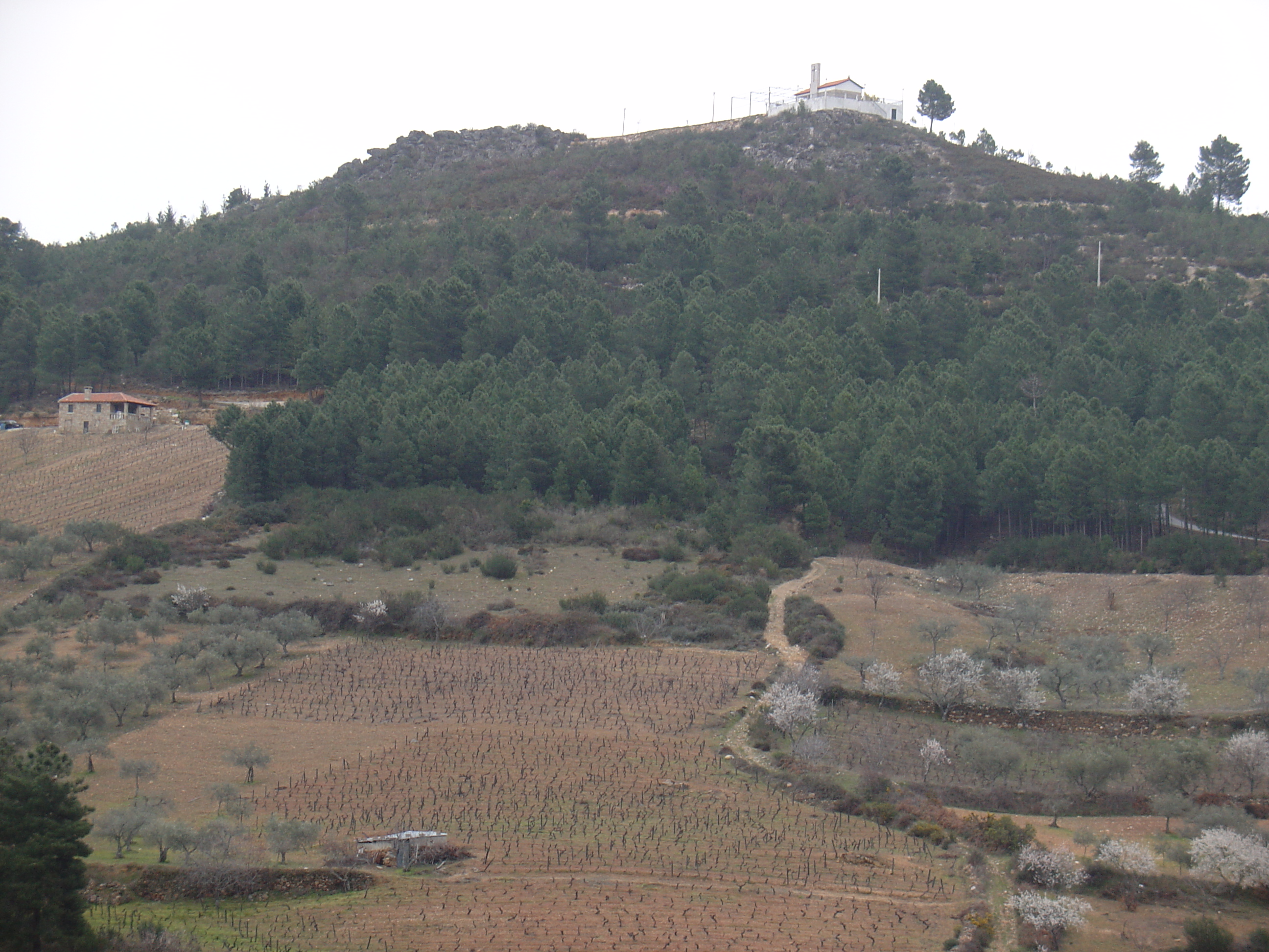 Cancelo-Monte de Santa Isabel